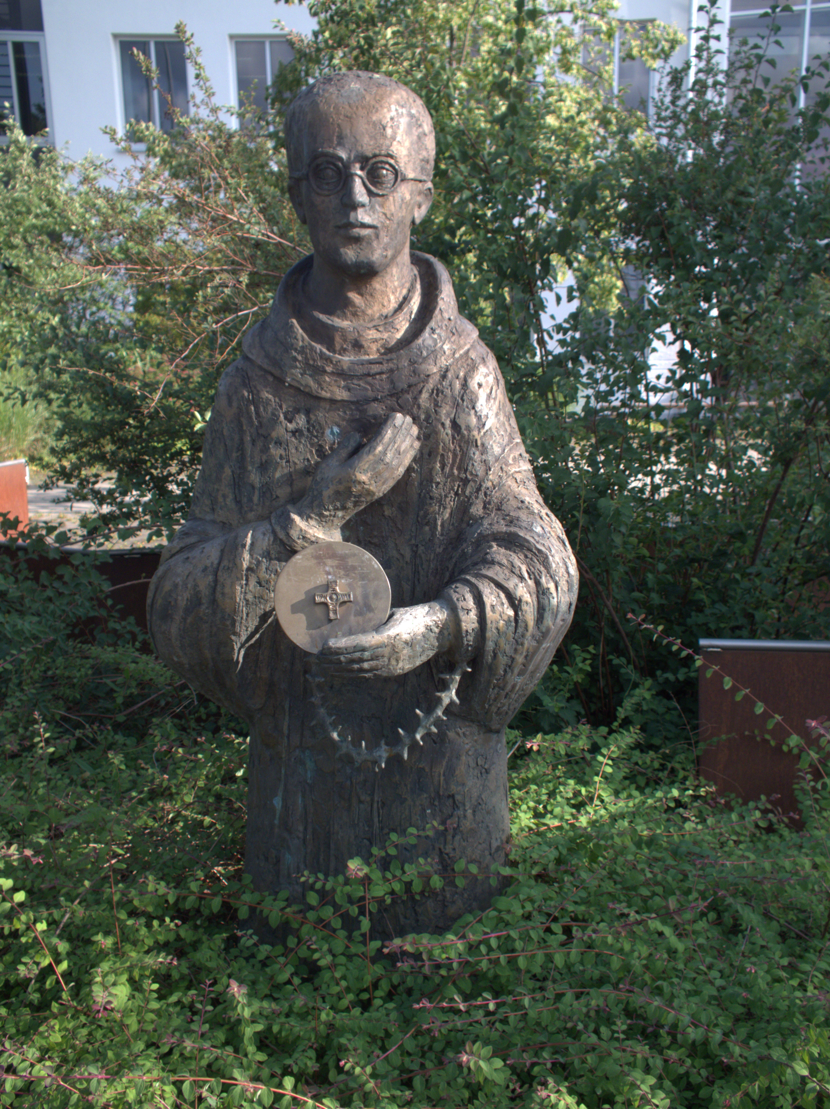 Maximilian Kolbe Schule in der Kerschensteiner Straße 7, Neumarkt